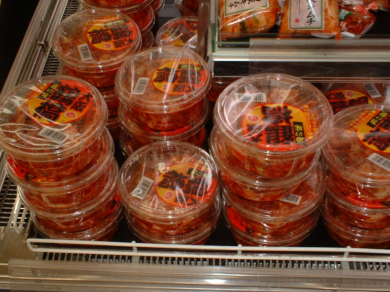 Gimchi sold at supermarke (スーパーで売っているキムチ)